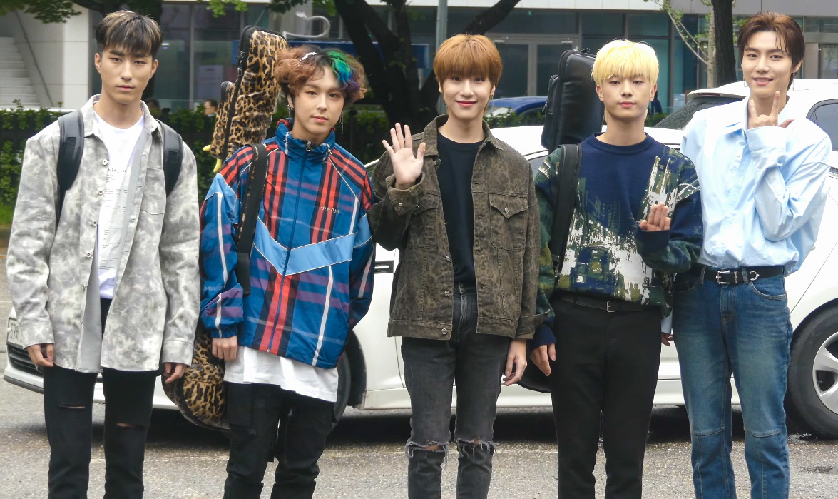 9월 6일 오전 서울시 영등포구 여의도 KBS 신관 공개홀에서 열린 '뮤직뱅크' 리허설에 참석하기 위해 원위(용훈, 강현, 하린, 동명, 키아)가 출근하고 있다. 원위 #ONEWE #용훈 #강현 #하린 #동명 #키아 #MUSICBANK #뮤직뱅크 #출근길 #뮤뱅출근길 원위, ONEWE, 용훈, 강현, 하린, 동명, 키아, MUSICBANK, 뮤직뱅크, 출근길, 뮤뱅출근길